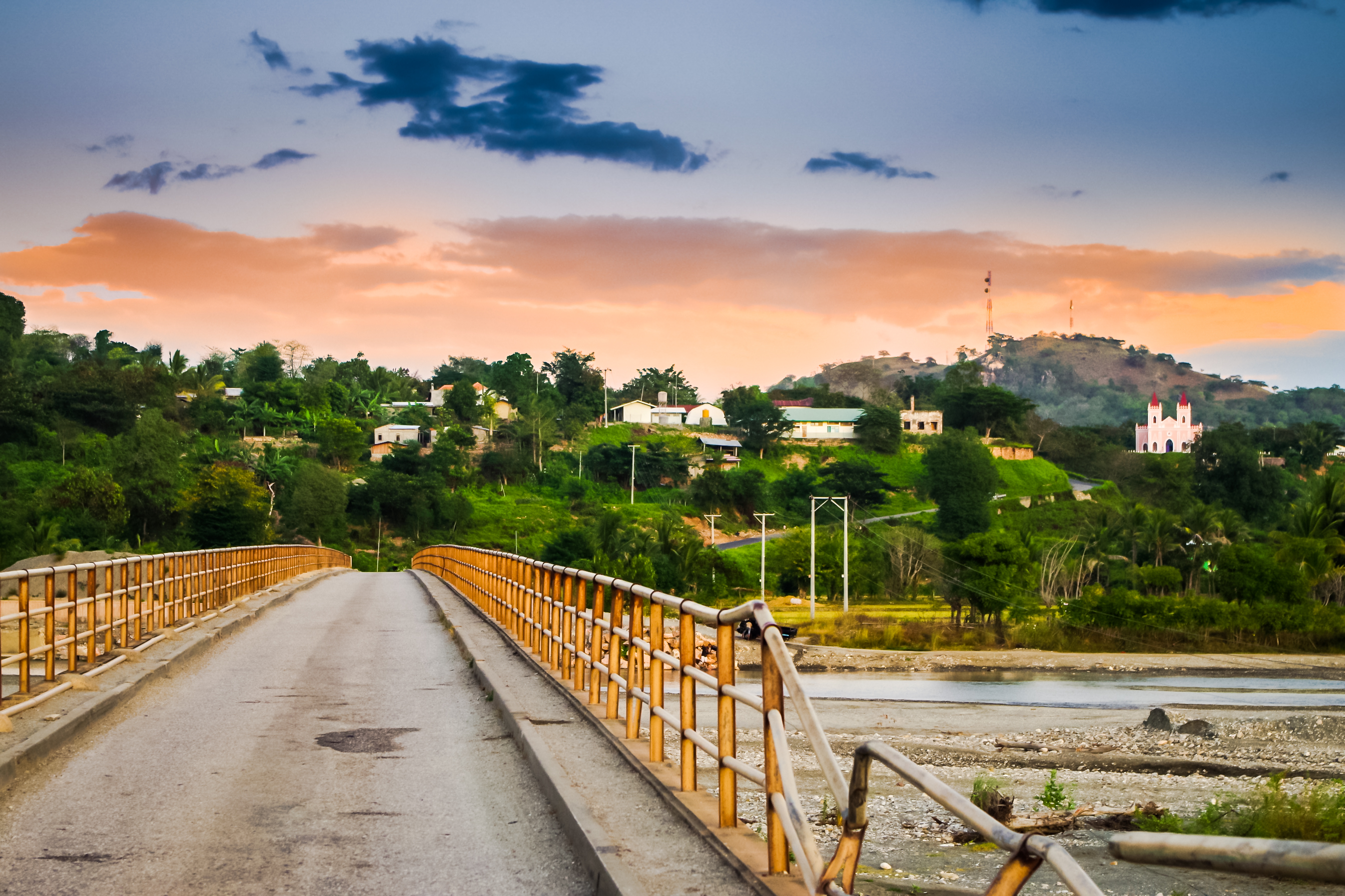 Laleia bridge